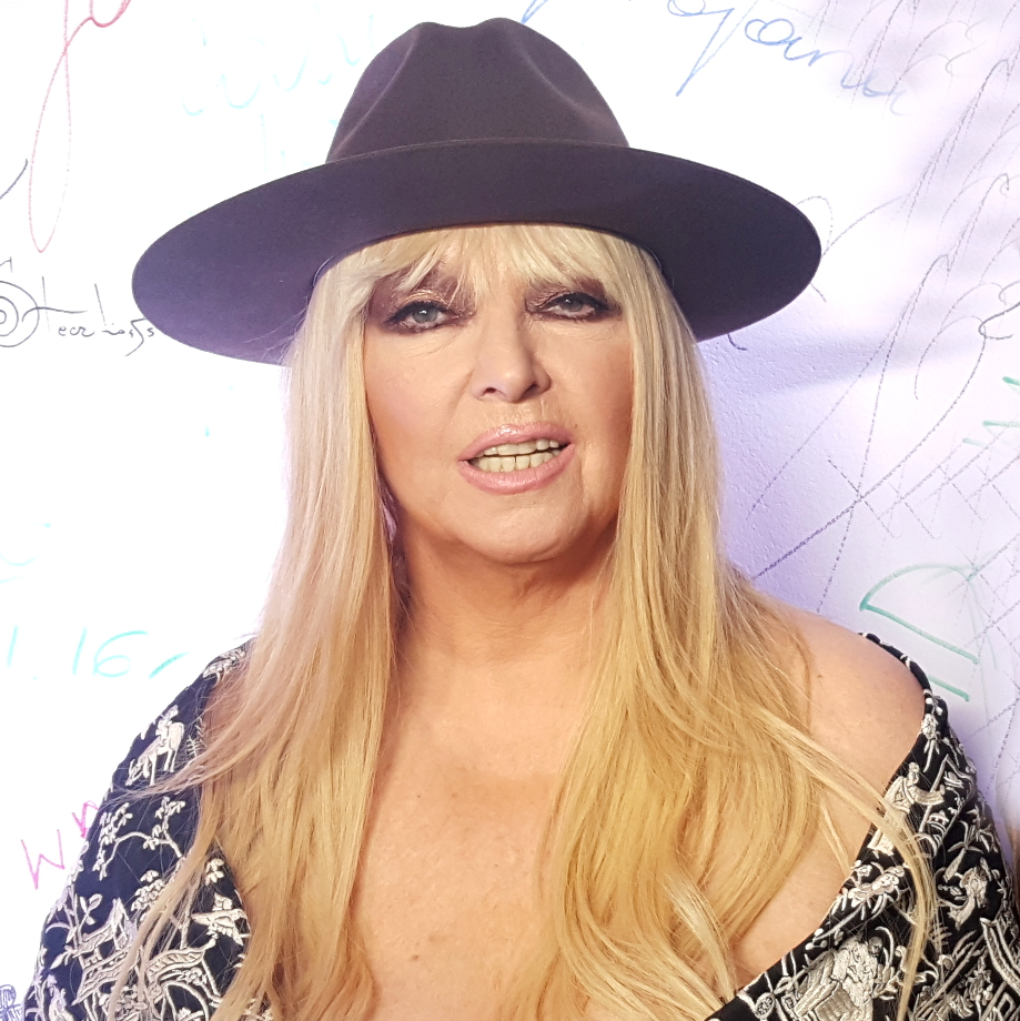 Polska piosenkarka Maryla Rodowicz w 2017 roku.